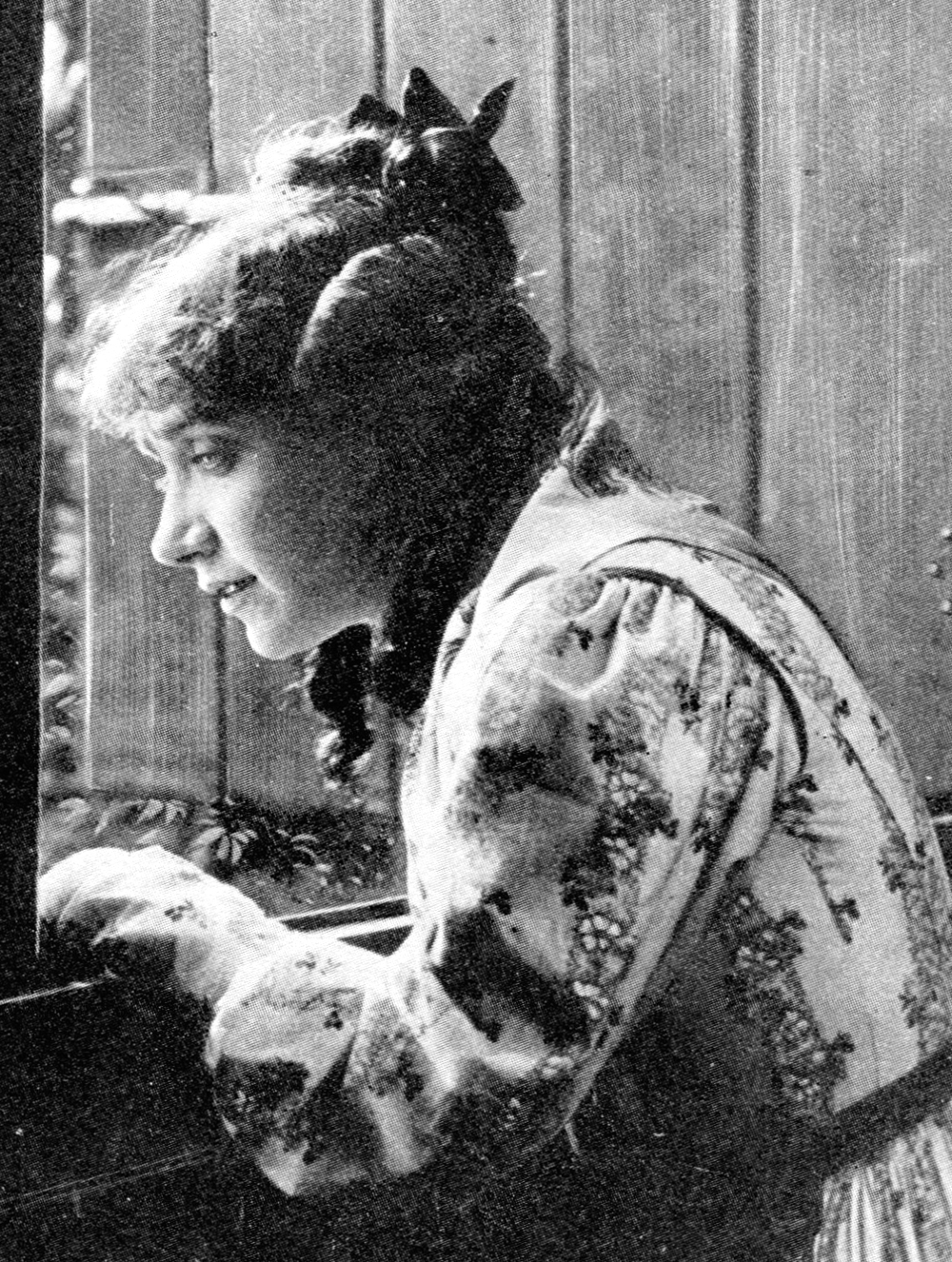 Fernanda Negri Pouget ne La lampada della nonna (1913)